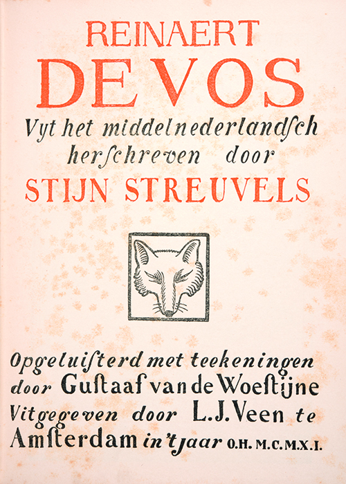 Stijn Streuvels, J. Houdmont-Carbonez & Gustave van de Woestyne, Reinaert de vos, 1911, papier.